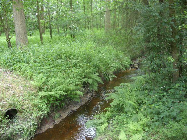 Naturschutzgebiet „Geestmoor-Klosterbachtal“ Klosterbach